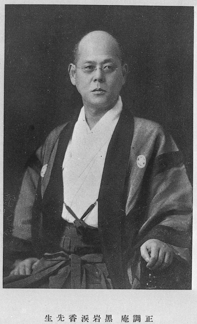 Portrait of Kuroiwa Ruiko (黒岩涙香, 1862 – 1920)